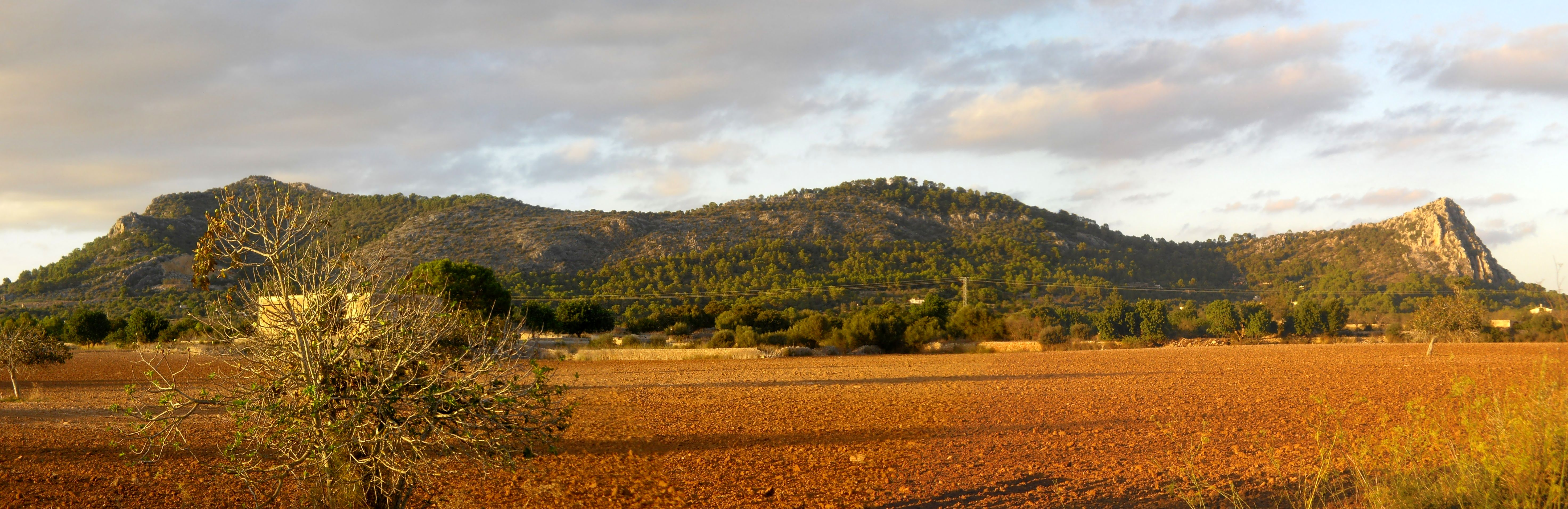 Serra de Galdent, al massís de Randa, entre els termes municipals de Llucmajor i Algaida.